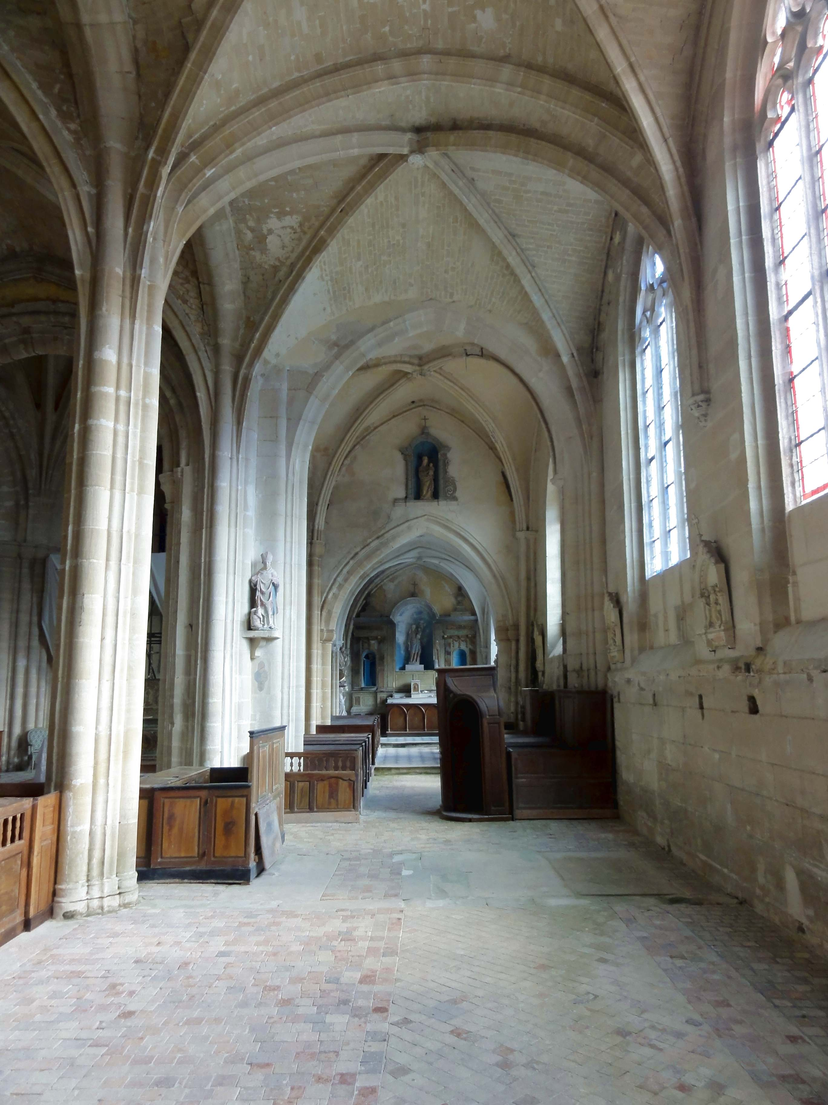 Intérieur de l'église - voir le titre du fichier.